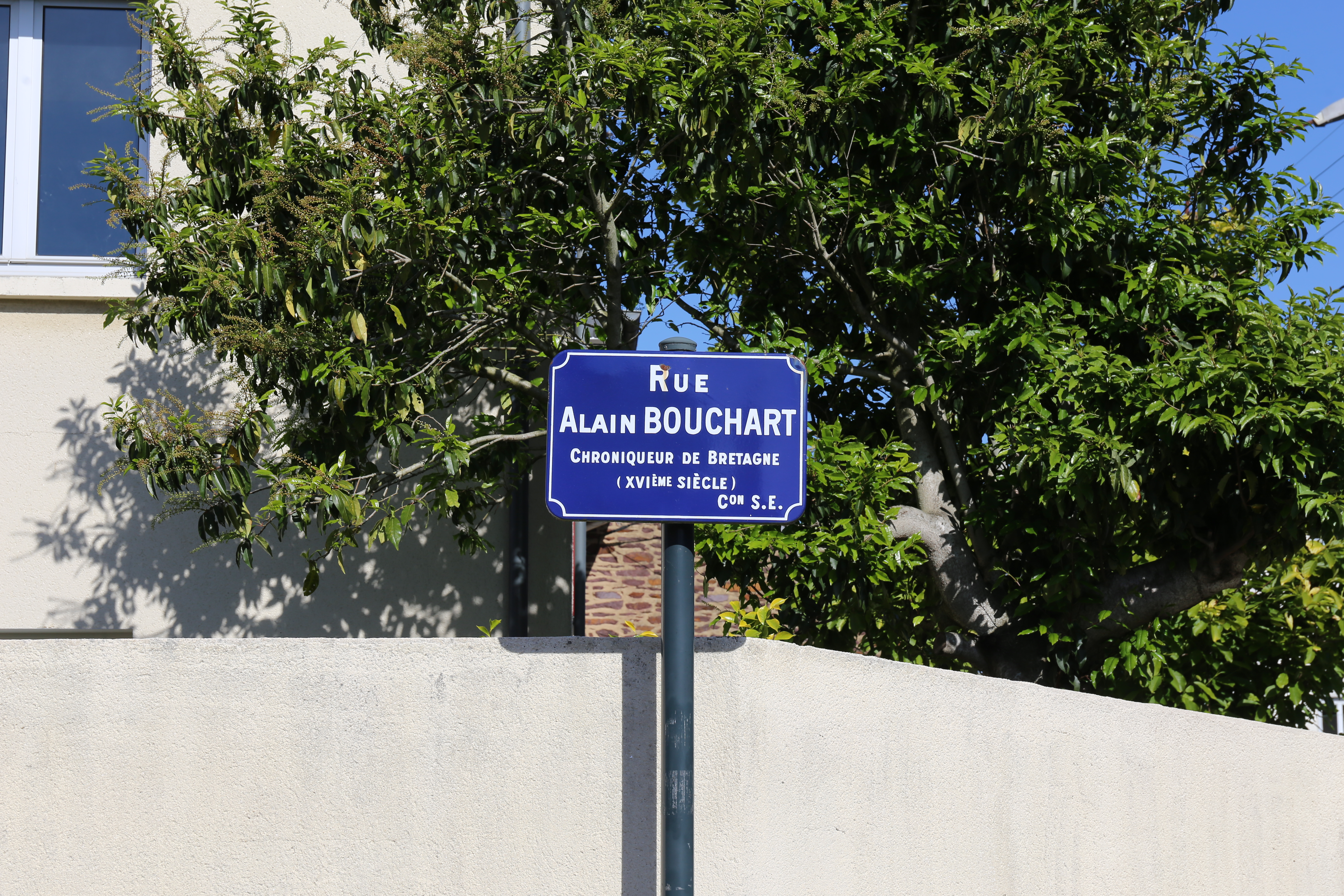 Plaque de rue de Rennes.